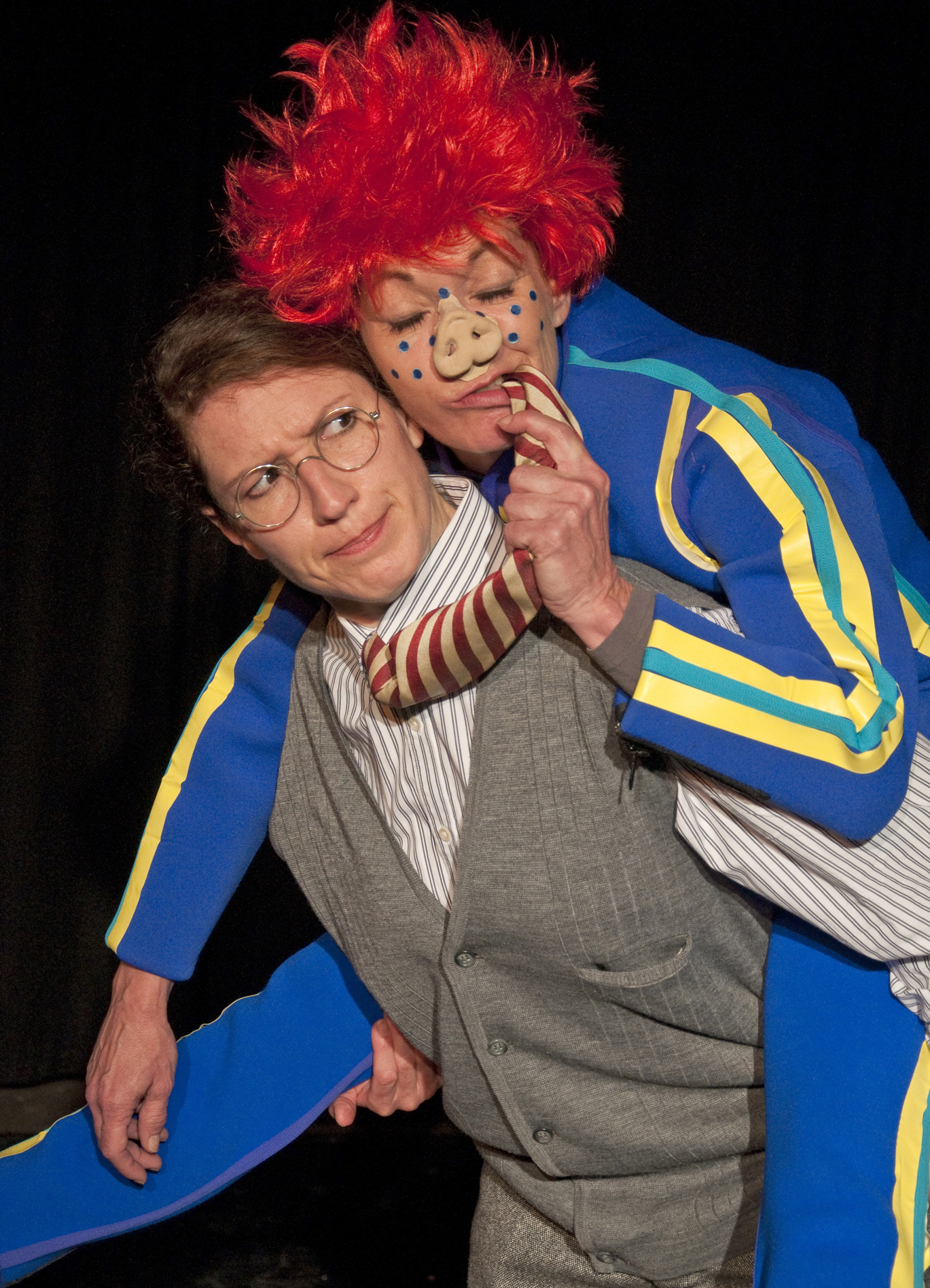 Kindertheater "Das Sams"